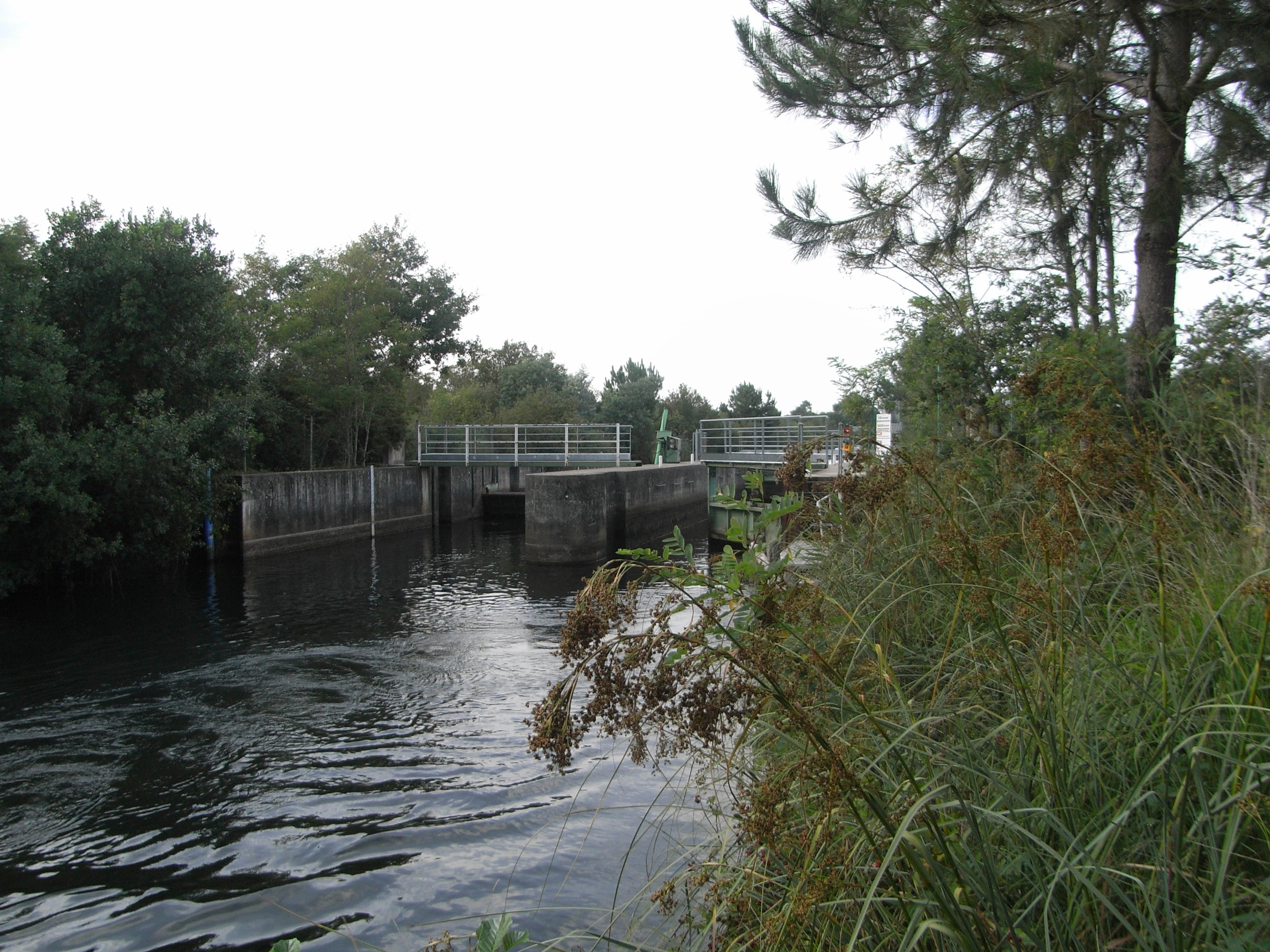 Canal des Landes partie située entre l'étang de Cazaux et de Sanguinet et l'étang de Biscarosse et de Parentis. Écluse de Navarrosse en libre service.